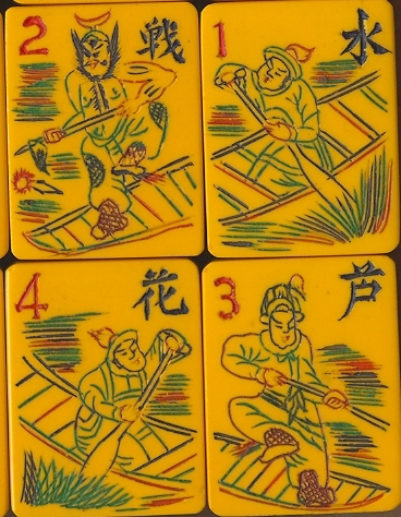 Foto van Mahjongstenen.